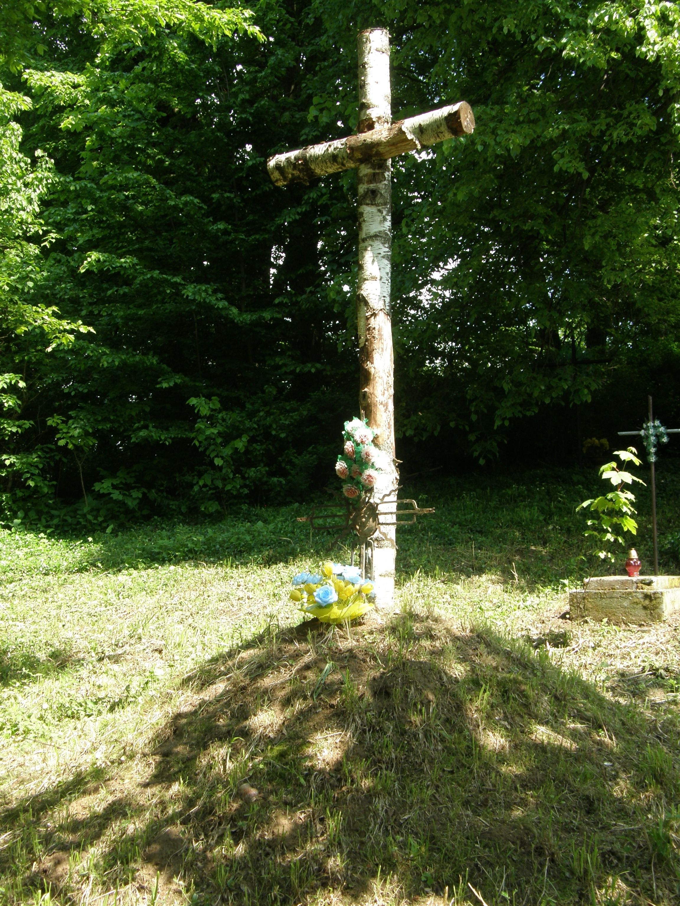 Mogiła Ukraińców zamordowanych w Bachowie w kwietniu 1945 przez polskie oddziały partyzanckie.